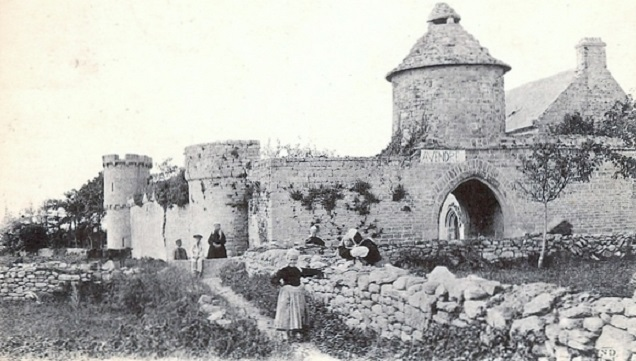 Le manoir de Kergoz vers 1900 (carte postale)